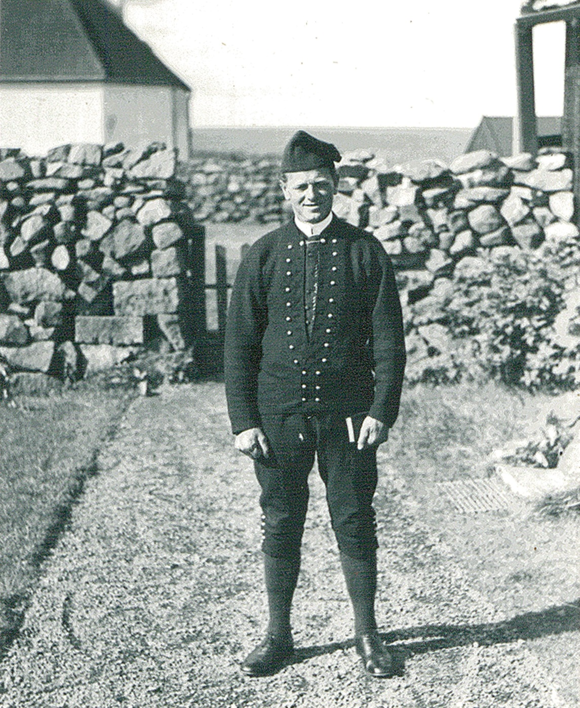 Fotografiet sidder i et fotoalbum lavet af Sophie Petersen med titlen "Færøerne". Fotoalbummet har nummer F5, og indgår i Det Kongelige Danske Geografiske Selskabs arkiv som af resultat af samarbejde mellem Etnografisk Samling og selskabet siden 2010 har været opstillet på Nationalmuseet som et selvstændigt arkiv. Arkivet er administreret af Etnografisk Samling. Det Kongelige Danske Geografiske Selskab har eksisteret siden det blev grundlagt 18. november 1876. Dets formål var at medvirke til “så vel at fremme kendskabet til jorden og dens beboere som at udbrede interessen for den geografiske videnskab” I arkivet findes blandt andet breve, dagbøger, regnskaber, kort og foredragsmanuskripter. Derudover indeholder arkivet over 70.000 fotografier.